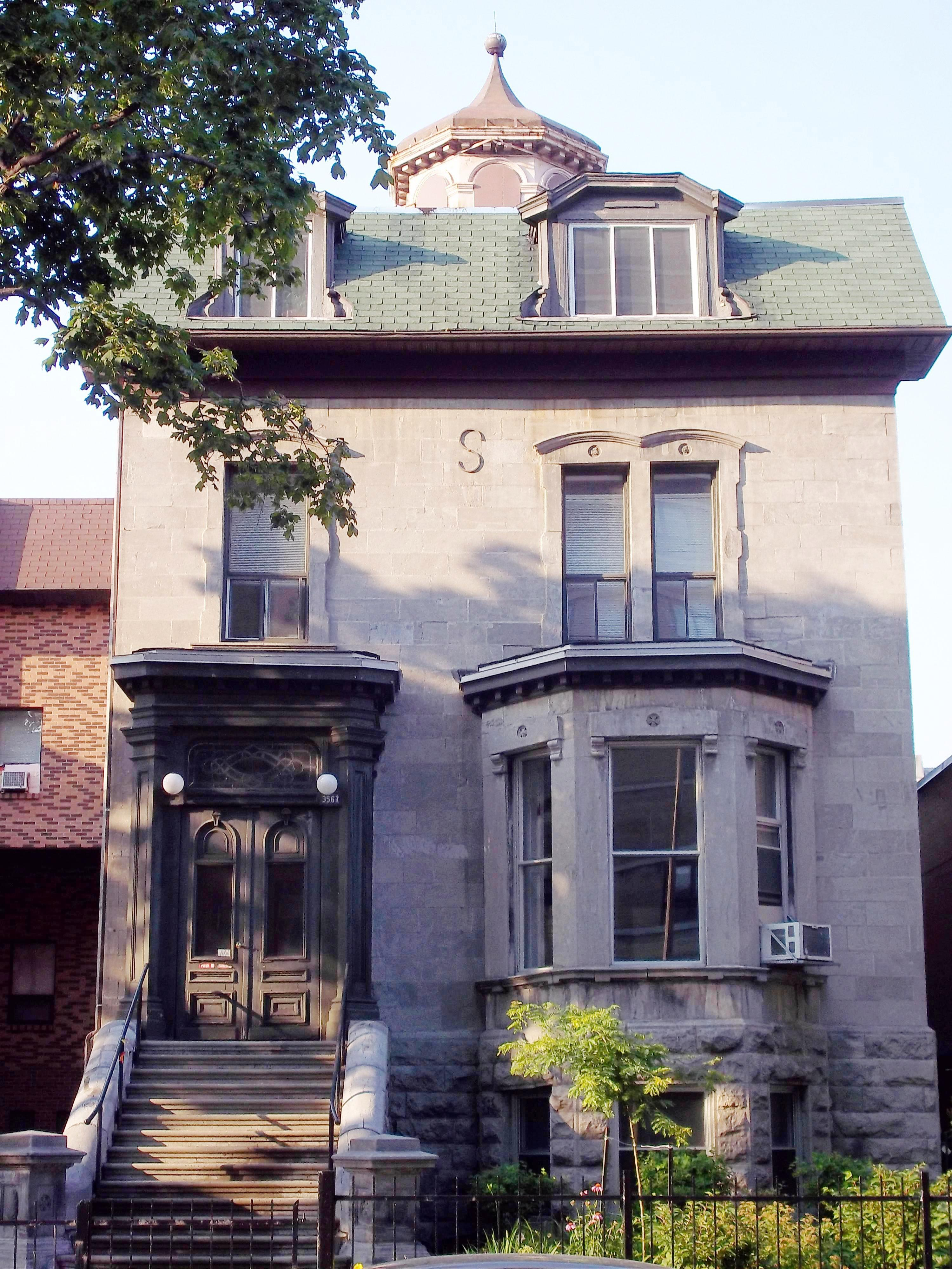 Maison Samuel-Burland, 3567 rue Saint-Urbain, Montréal